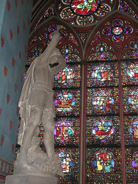 Notre-Dame de Paris. Statue de saint Georges dans la chapelle rayonnante saint Georges